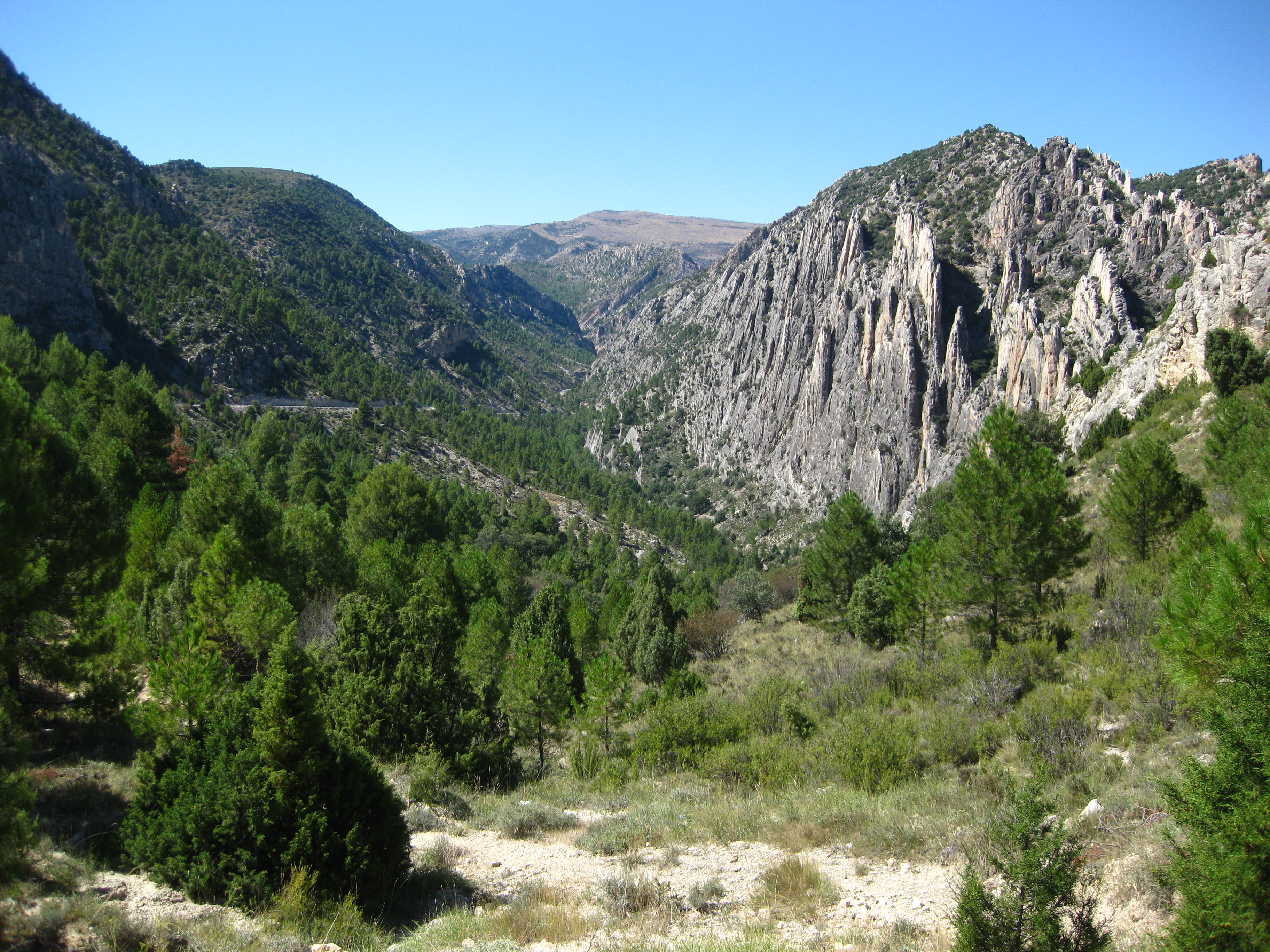 Organos de Montoro, Maestrazgo mountain range in Teruel.